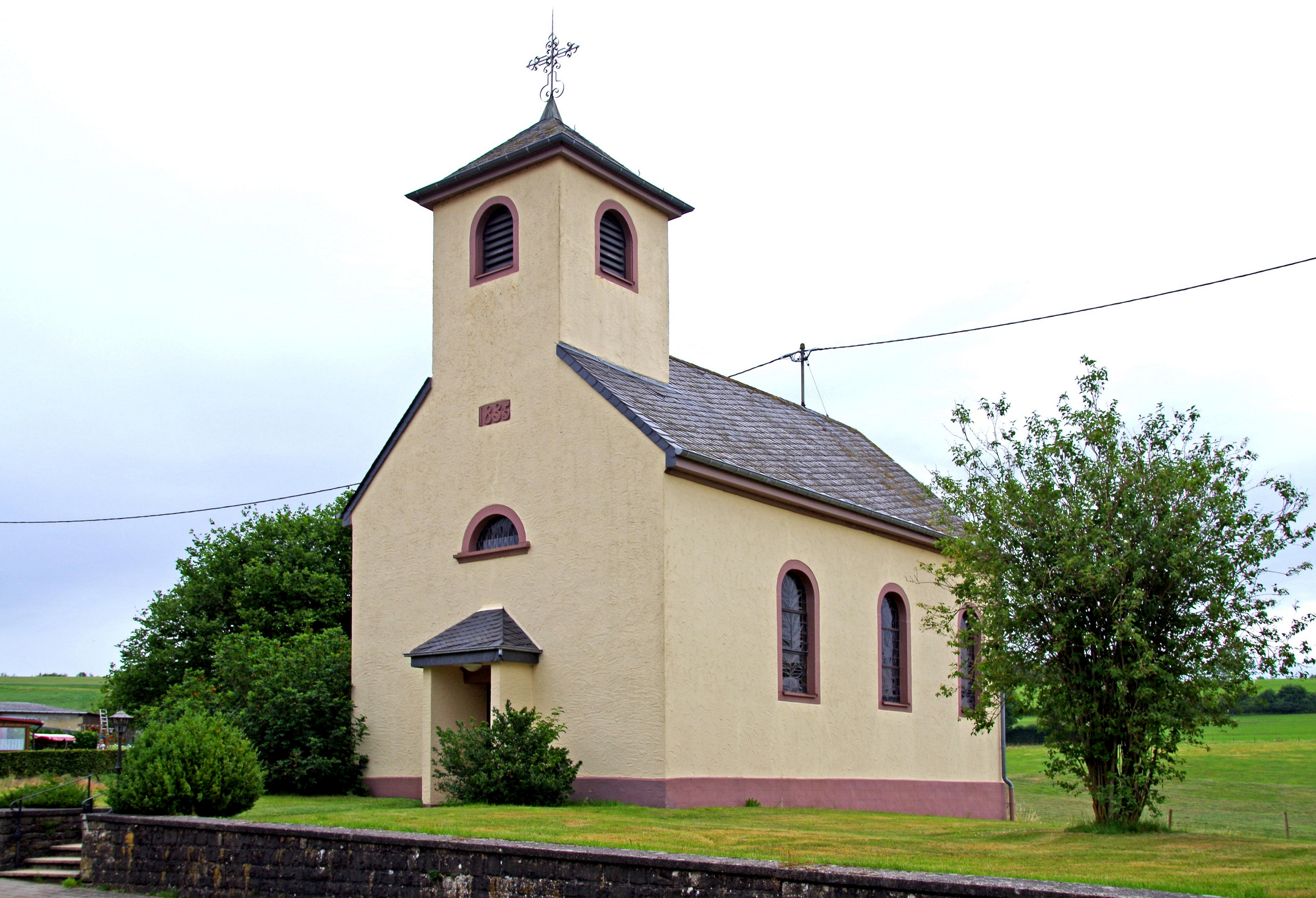 St. Petri Stuhl (Heilenbach), Südwestansicht